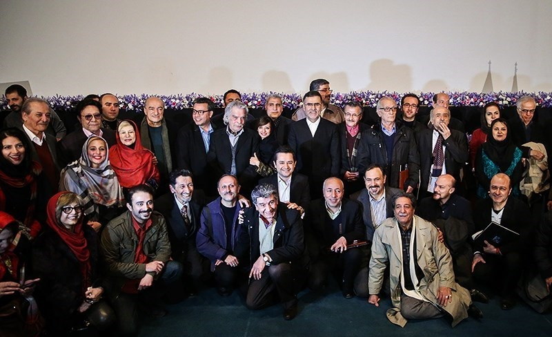 نگاره‌ای از مراسم بزرگداشت سه نسل از هنرمندان دوبله ایران